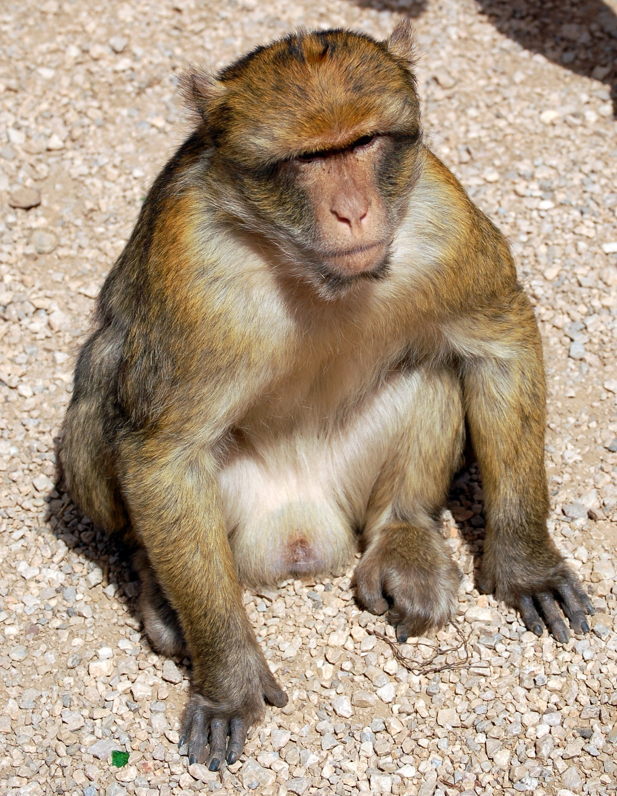 Macaca sylvanus